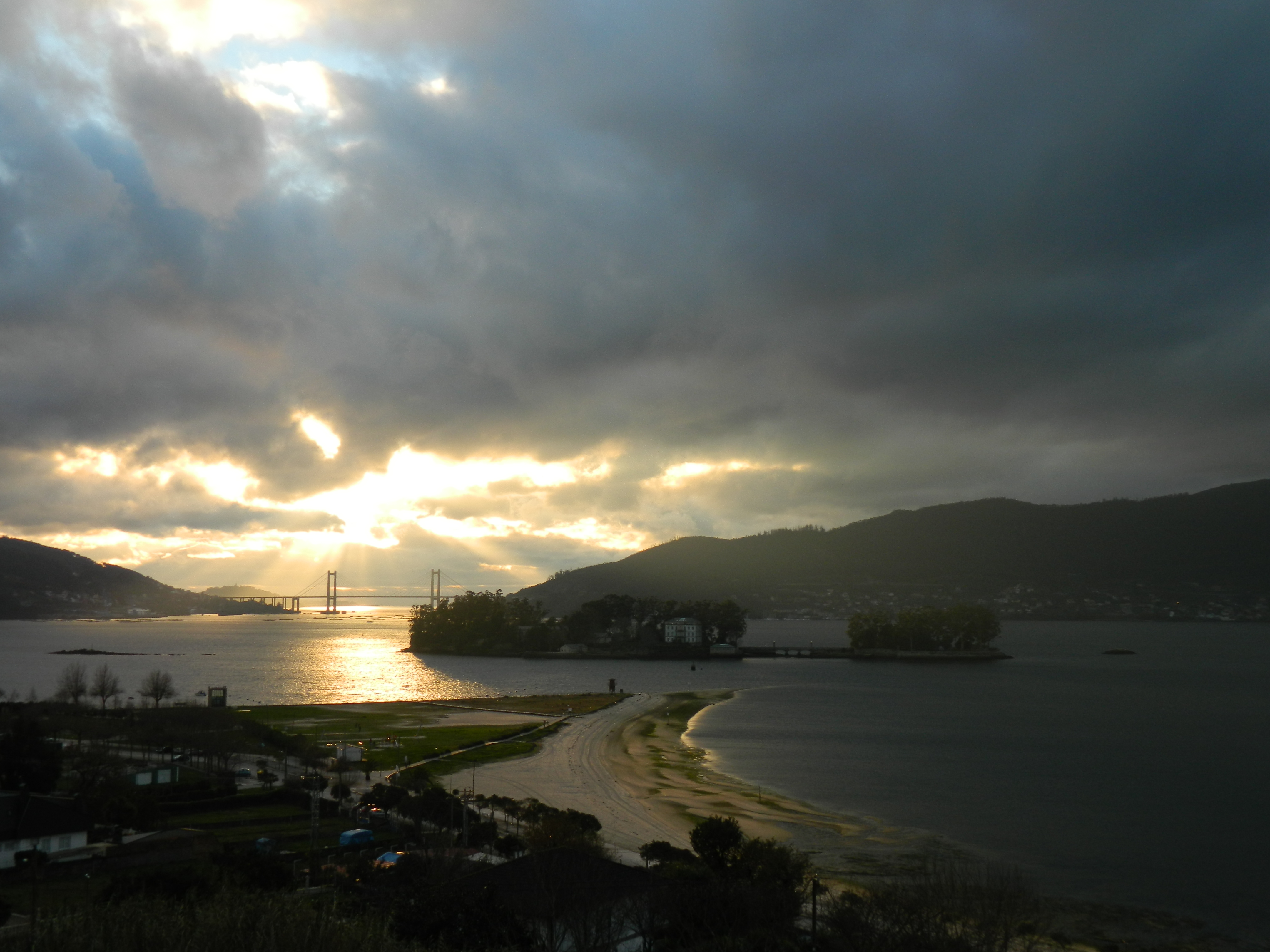 Praia de Cesantes, (Cesantes, Redondela) ao solpor. Ao fondo, a Illa de San Simón.